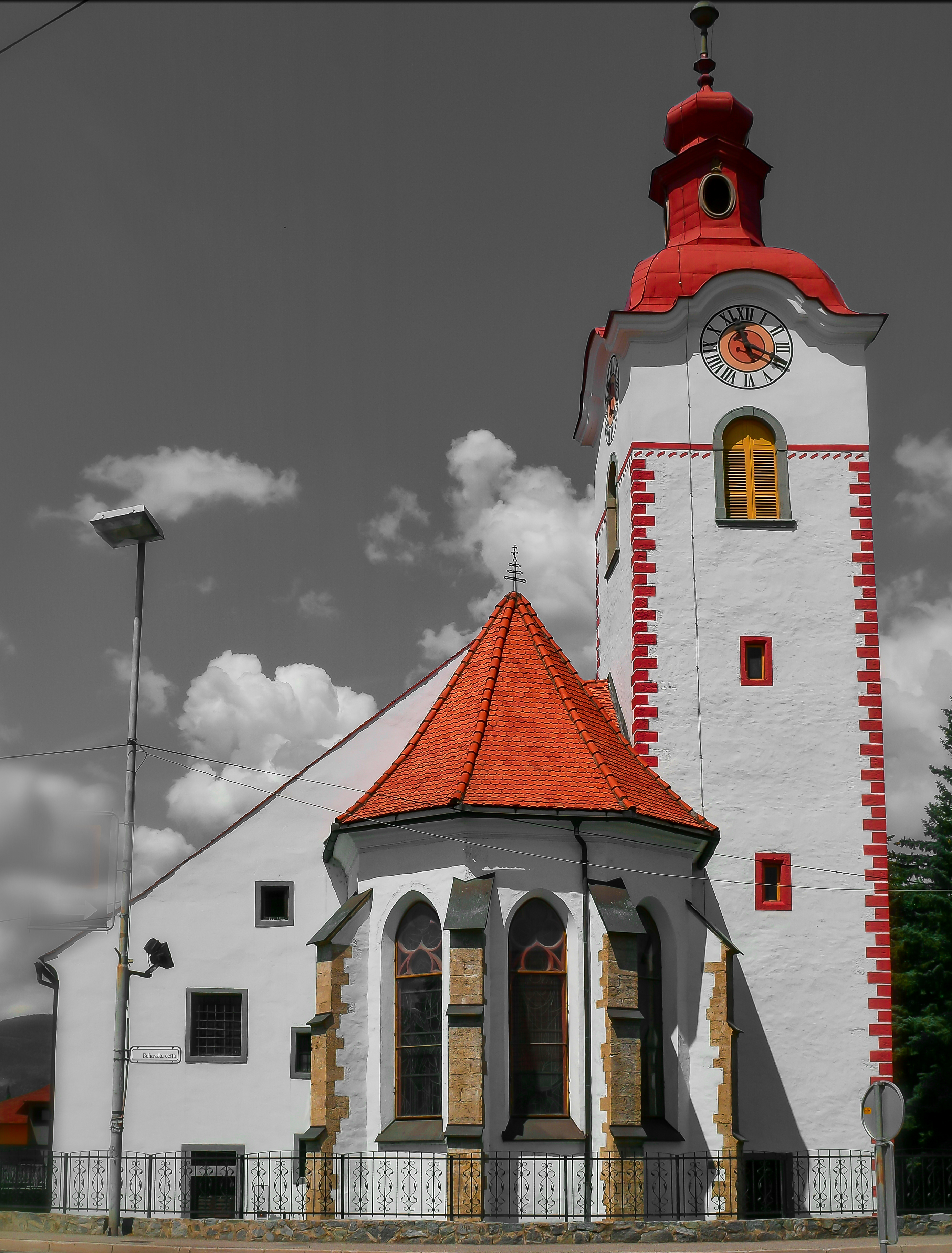 Church in Hoče, Slovenia foto: Grega Pirc